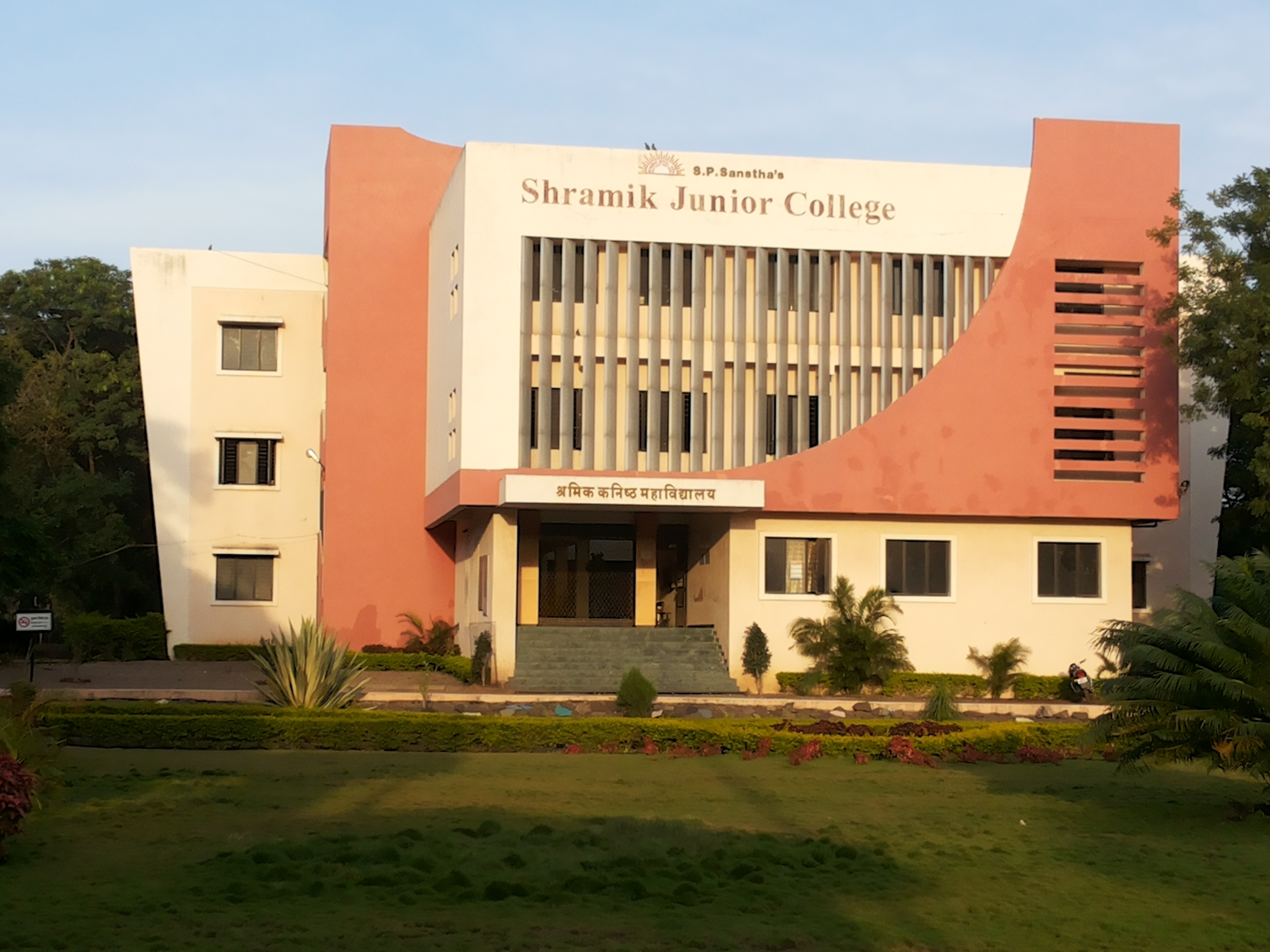 श्रमिक कनिष्ठ महाविद्यालय